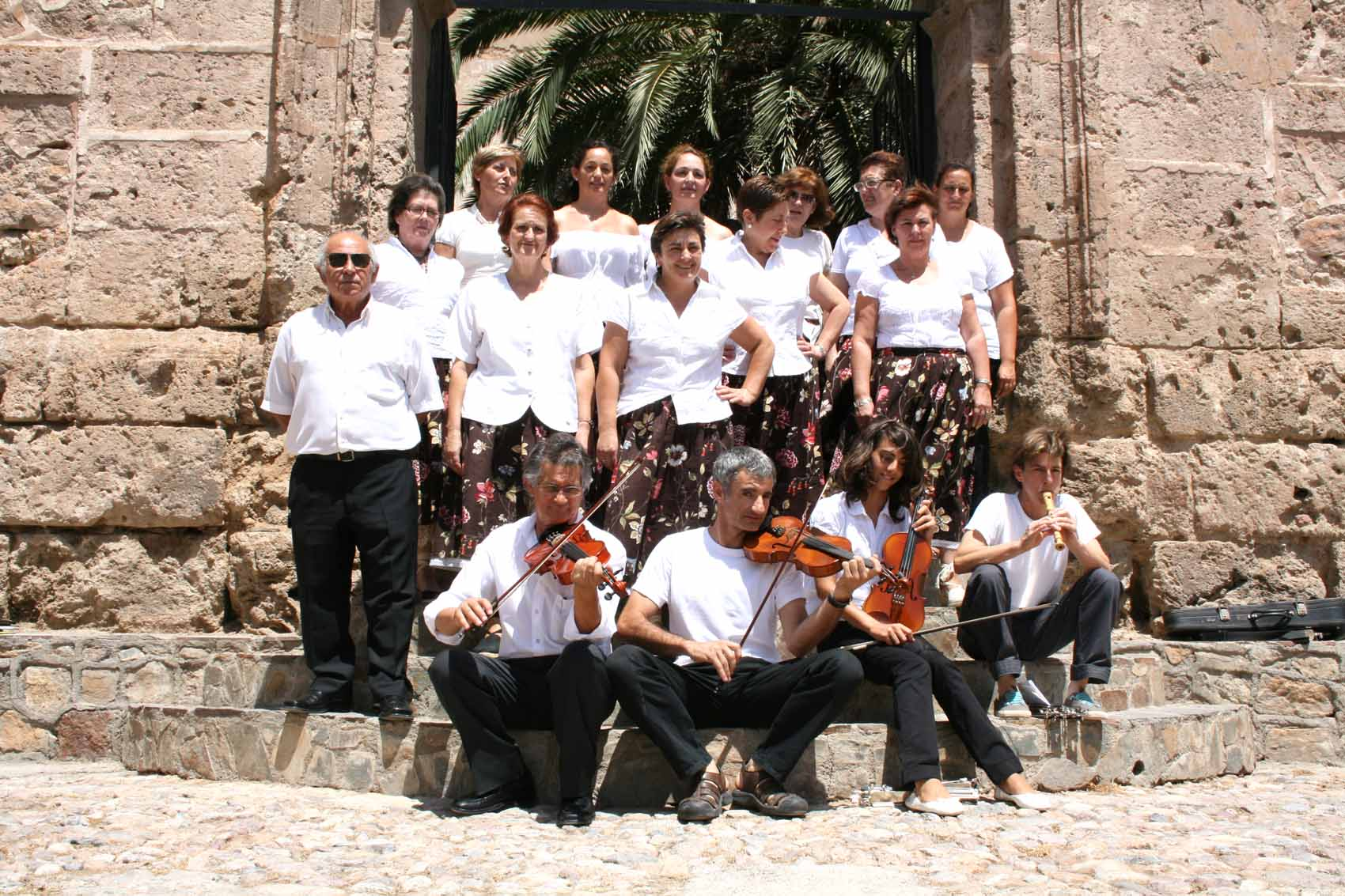 Foto del coro de Almócita "Los Tres Caños", a la salida de una de sus actuaciones en la iglesia.